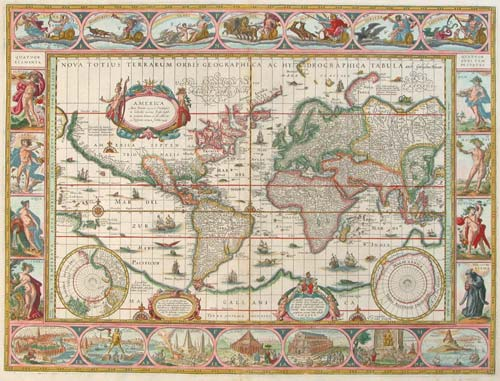 Nova Totius Terrarum Orbis Geographica ac Hydrographiva TabulaEen nieuwe Geographie van geheel het Land der Wereld met Hydrografische Tafel"Willem Janszoon BlaueAmsterdam, circa 1640Auteursrecht RUIMSCHOOTS verlopen